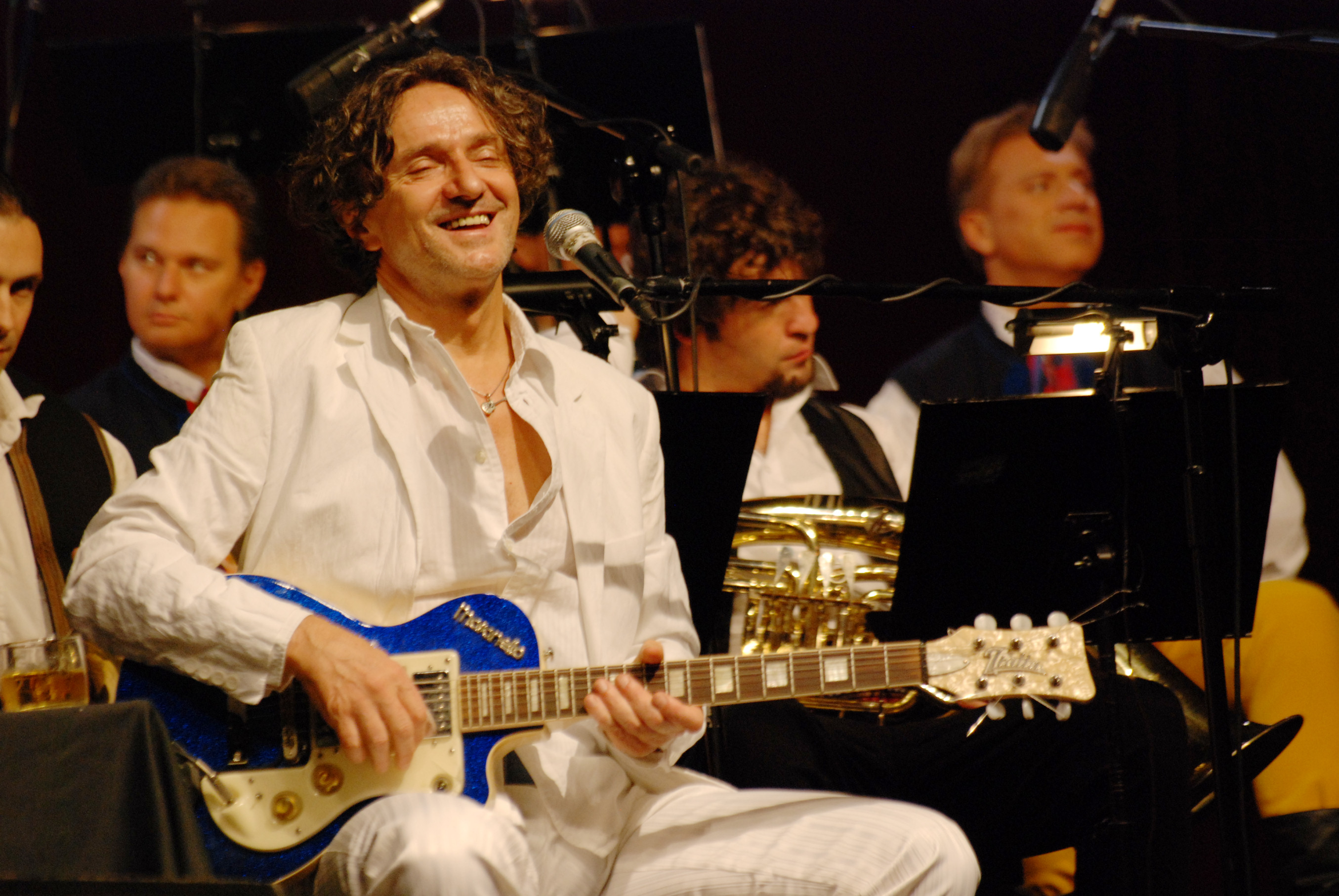 Jubileuszowy koncert Zespołu Pieśni i Tańca "Śląsk" oraz Gorana Bregovića wraz z "Wedding & Funeral Orchestra"